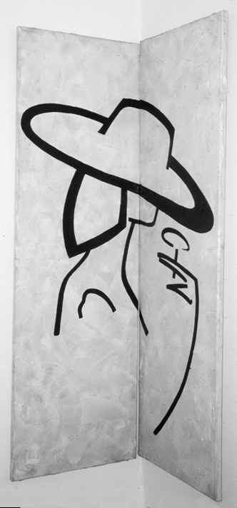 Titel: Die Raucherin, ( Eckbildmalerei ) besteht aus 2 Leinwände Technik: Öl und Silikon auf Leinwand Deminsion: 2 x (140 cm x 45 cm) Ursprungsland: Berlin, Deutschland